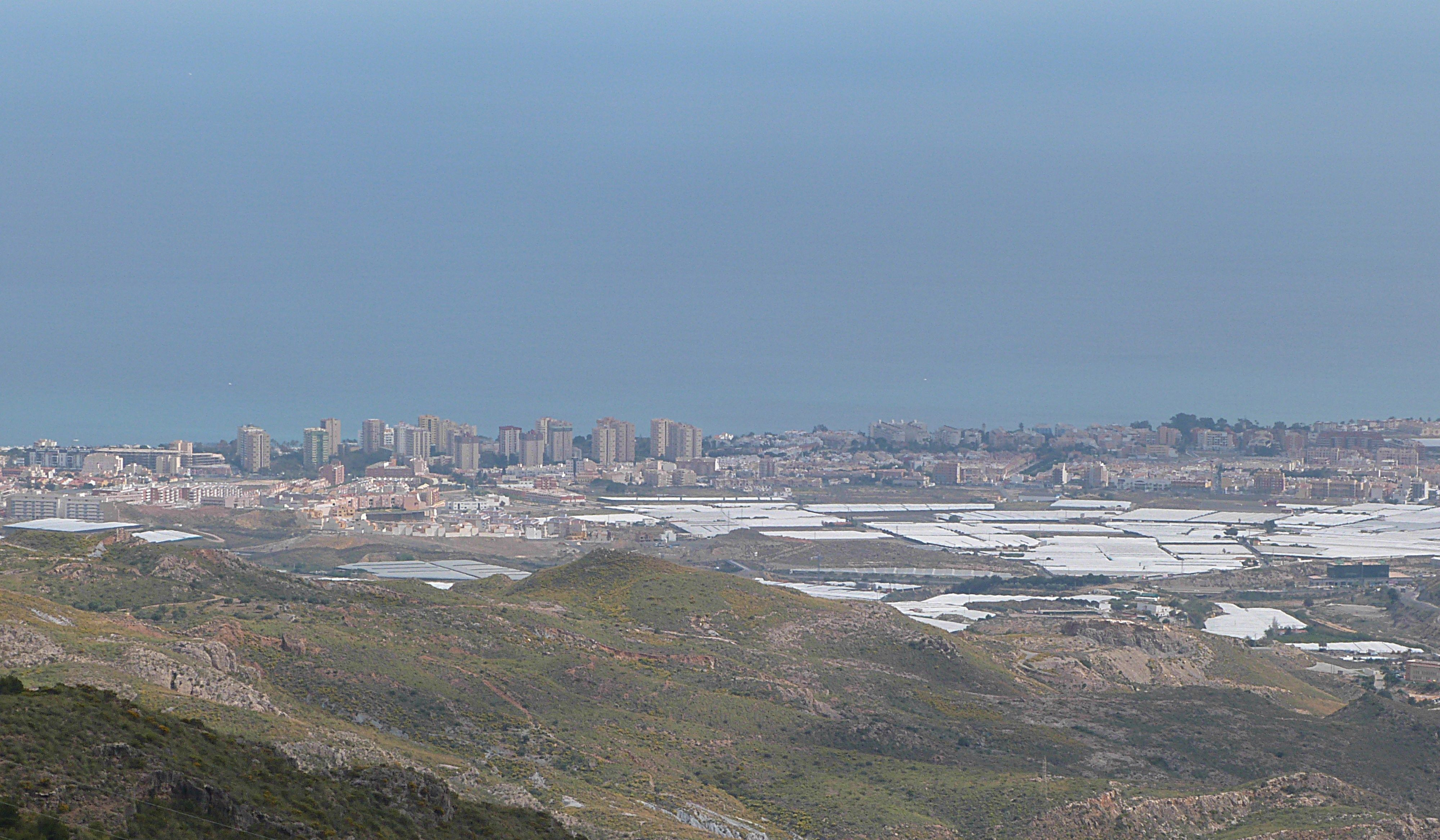 Roquetas de Mar